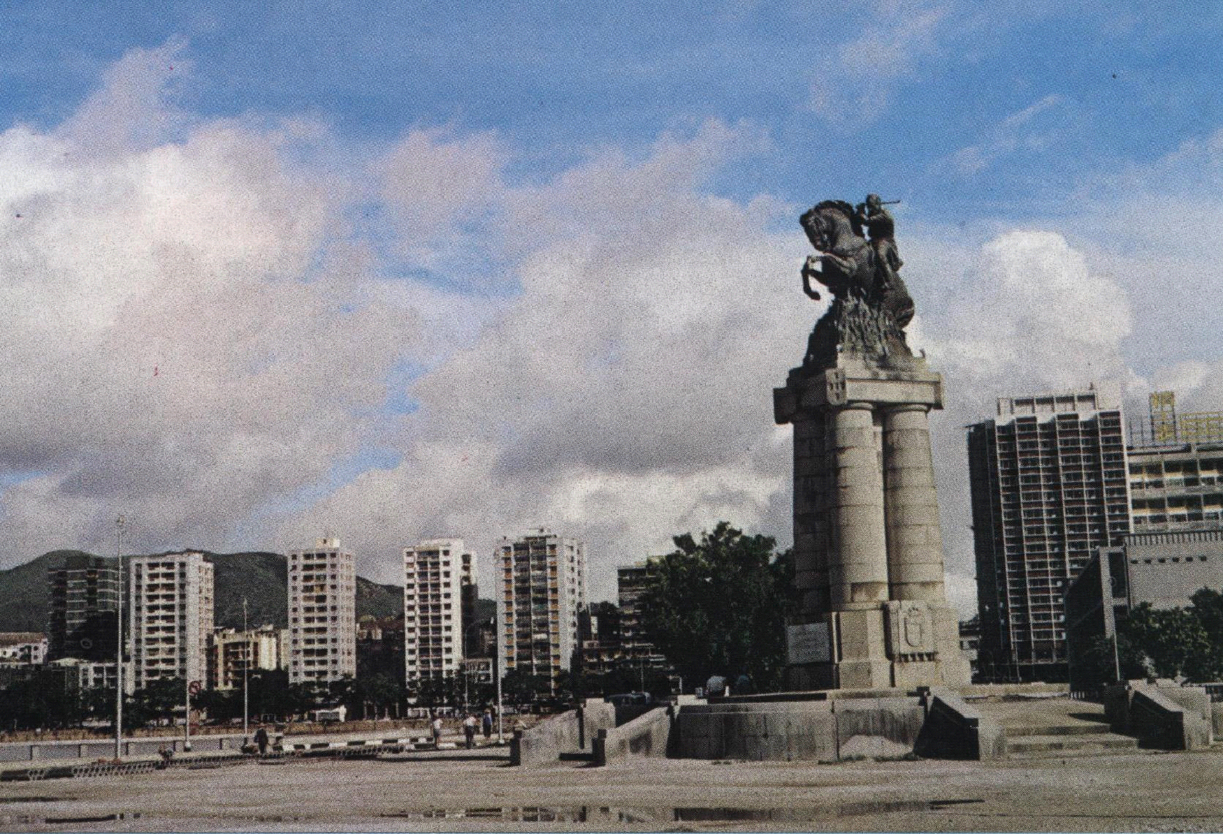 1983年前的亞馬喇前地